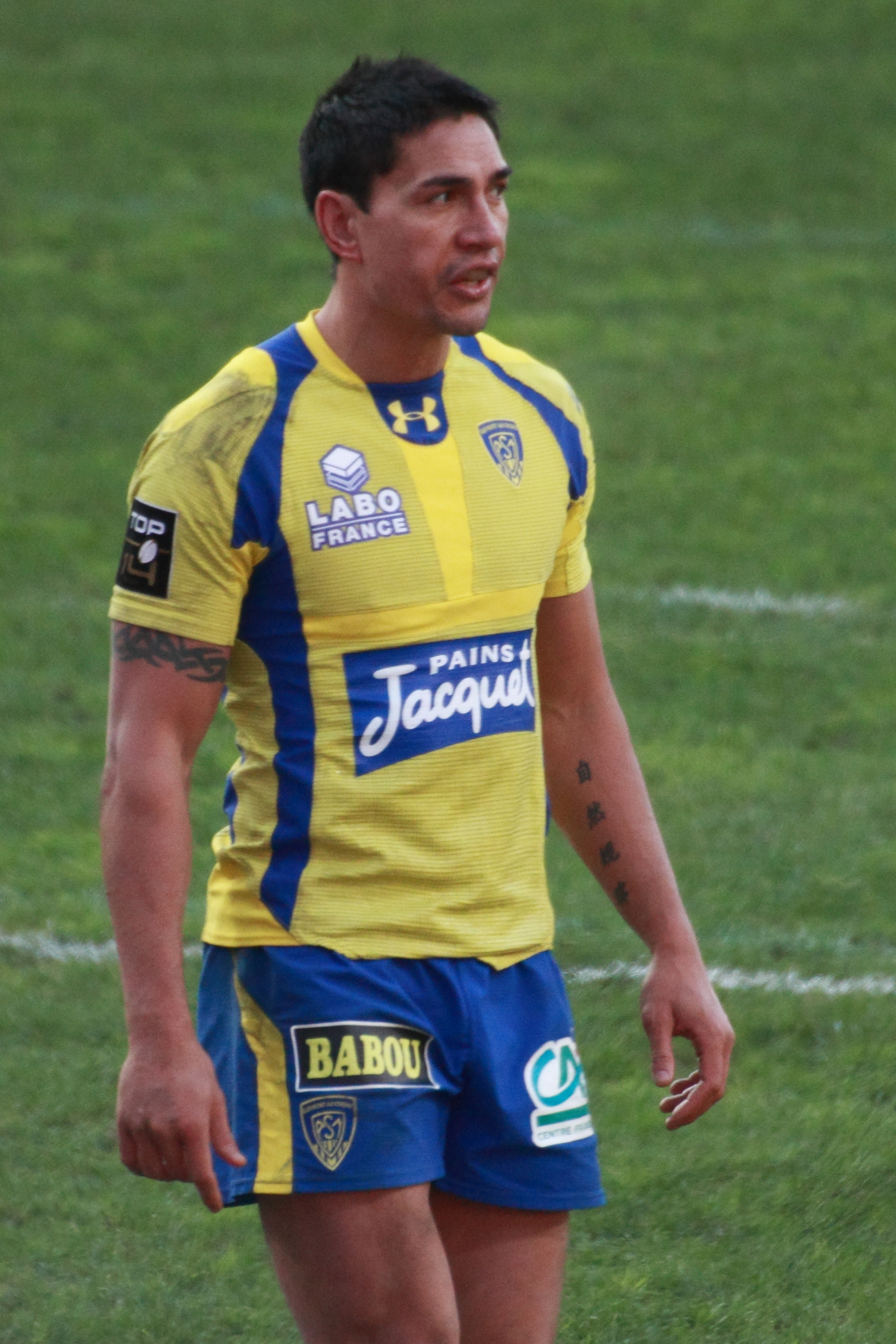 Top 14 2012-2013 — 1 décembre 2012, Stadium de Toulouse. Match between: Stade toulousain — ASM Clermont-Auvergne